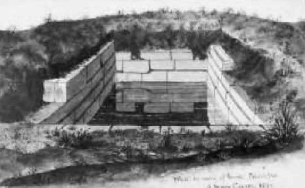 Steinbecken "Coventinas Well" beim römischen Kastell Carrawburgh/Brocolitia, Zeichung von 1878.